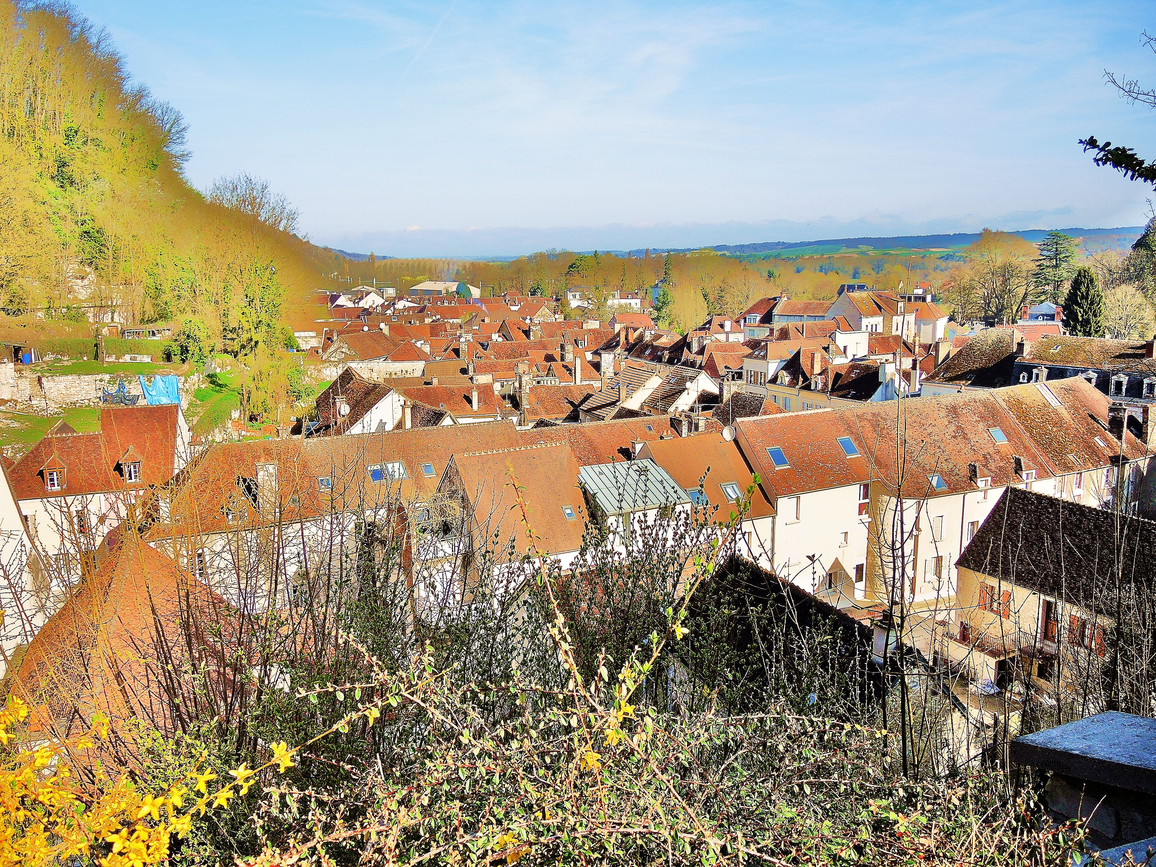 Panorama sur la ville de Tonnerre, côté Nord-Ouest.